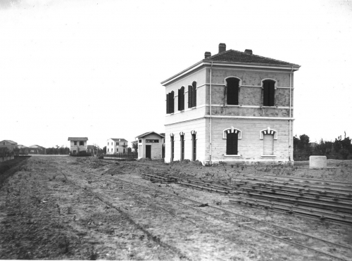 MICH. 2378 - Ferrovia Rolo-Mirandola - stazione di Concordia ultimata